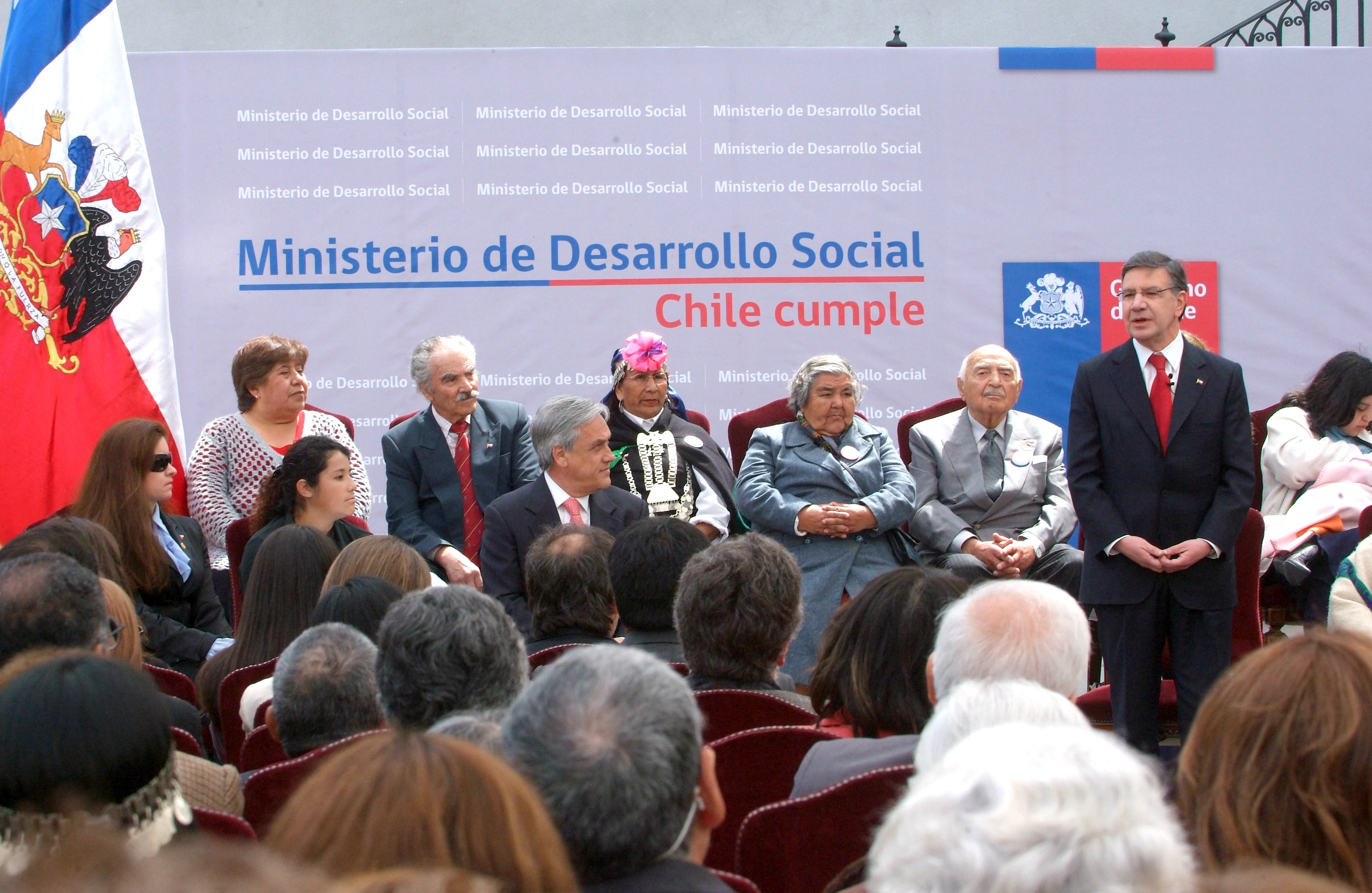 Promulgación ley que crea el Ministerio Desarrollo Social, 13 de octubre de 2011.